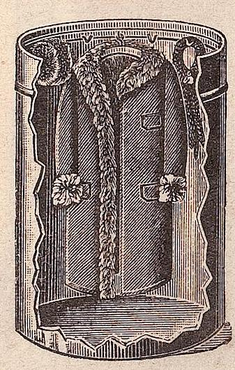 Heussi's Pelzkapsel mit japanischem Kampferholz. Anzeige im Beiblatt der Fliegenden Blätter, Leipzig 3. März 1911.